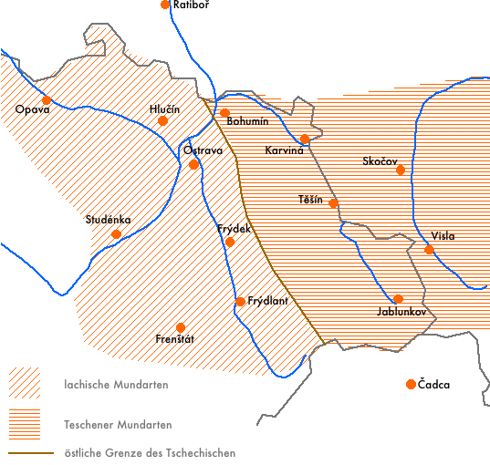 Lachische Sprache, Verbreitung